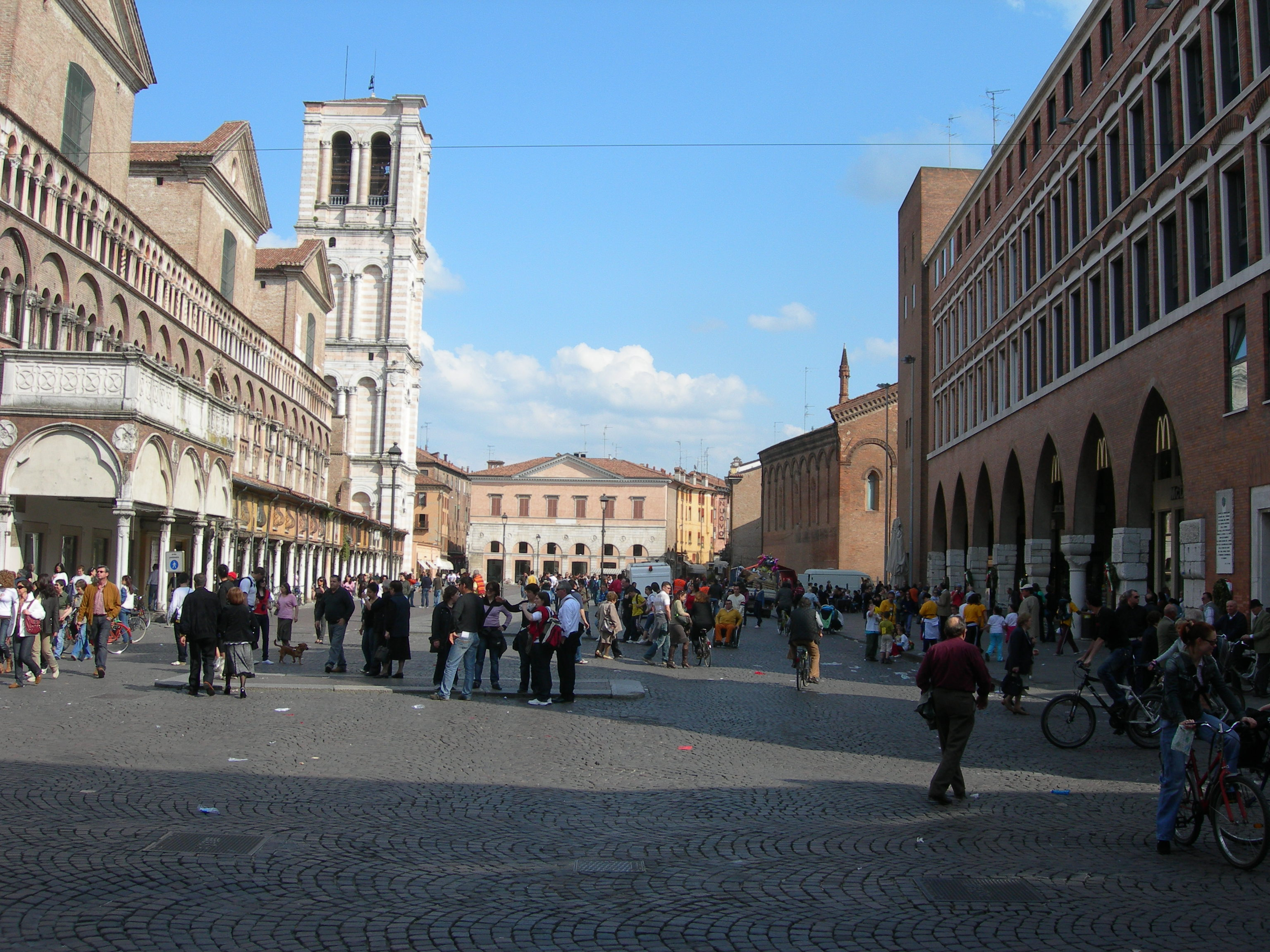 Piazza Trento e Trieste a Ferrara.